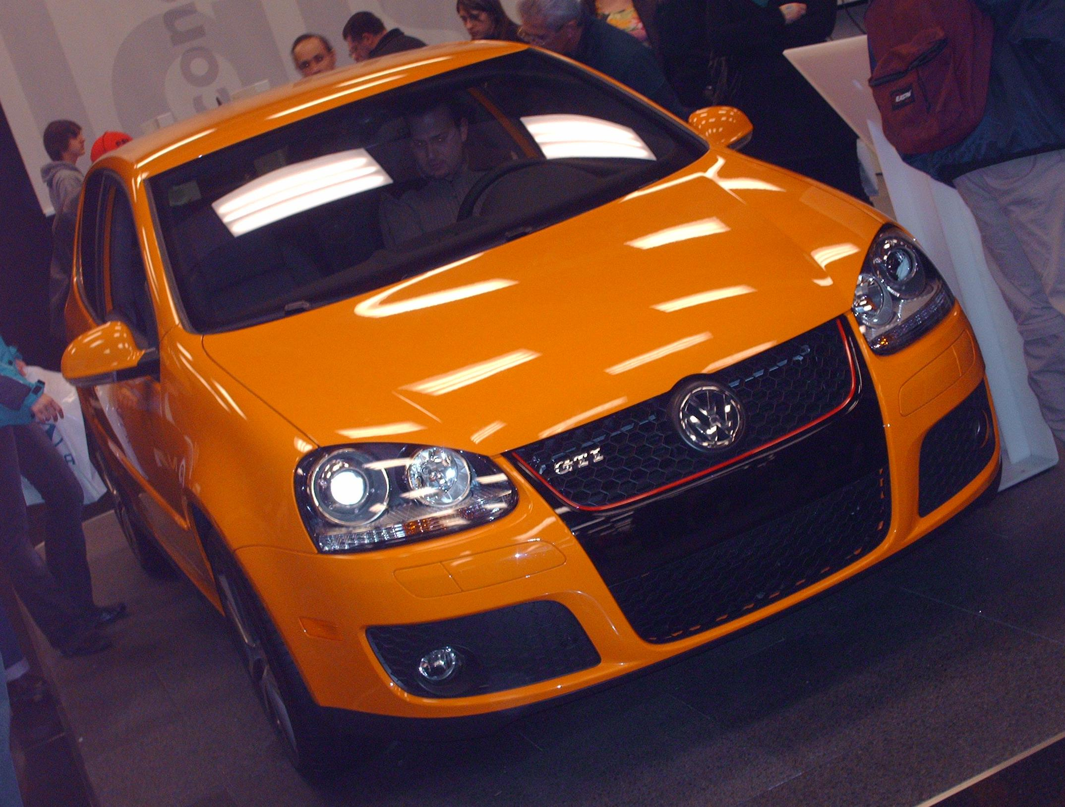 2007 Volkswagen GTI photographed at le Salon International de l'auto de Montréal 2007.